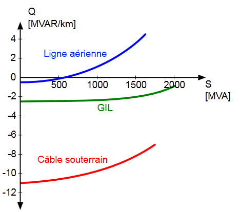 Traduction francaise de Natuerliche Leistung 400kV-Leitung-GIL-Kabel.svg